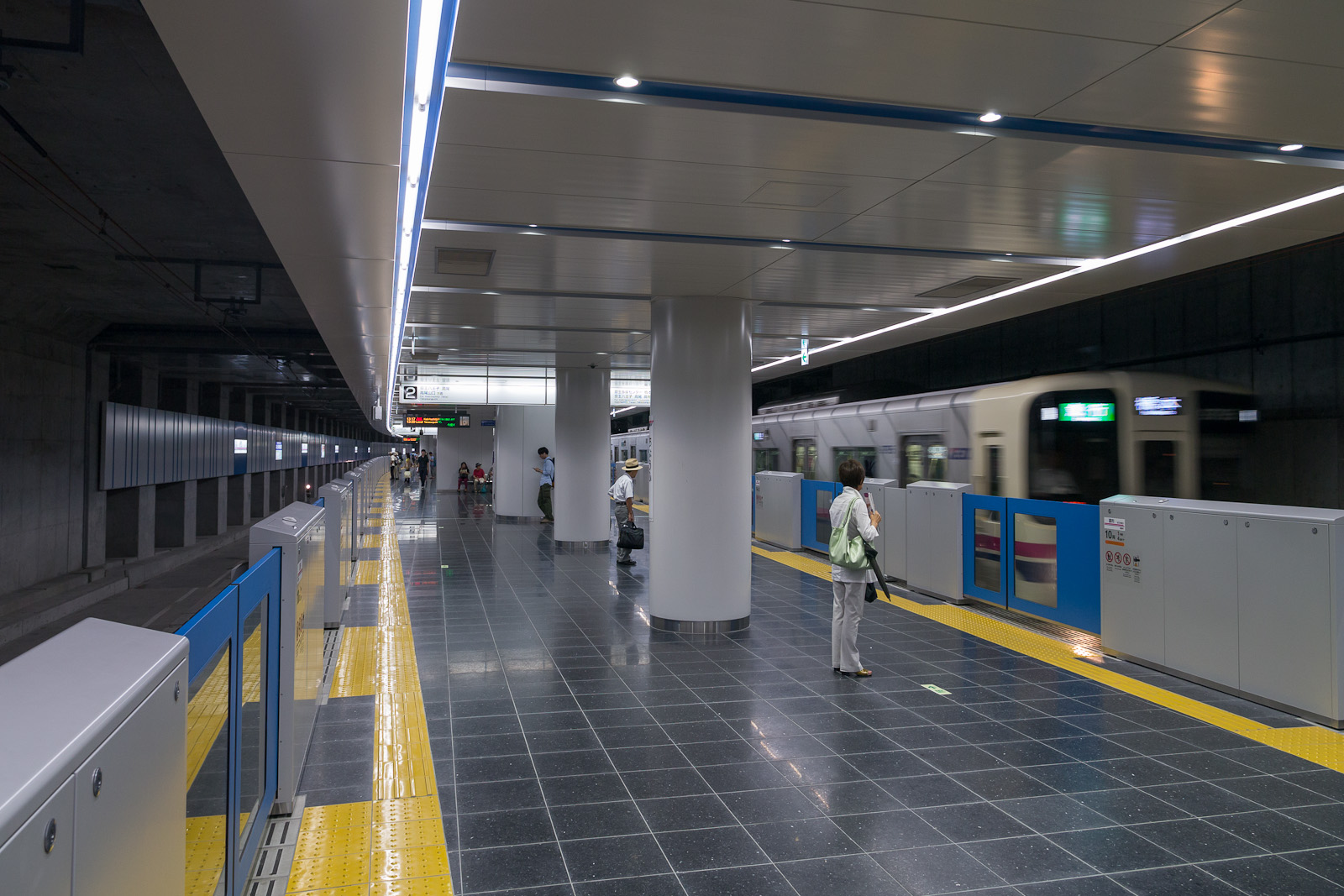 京王電鉄調布駅、地下化された下り線ホーム。